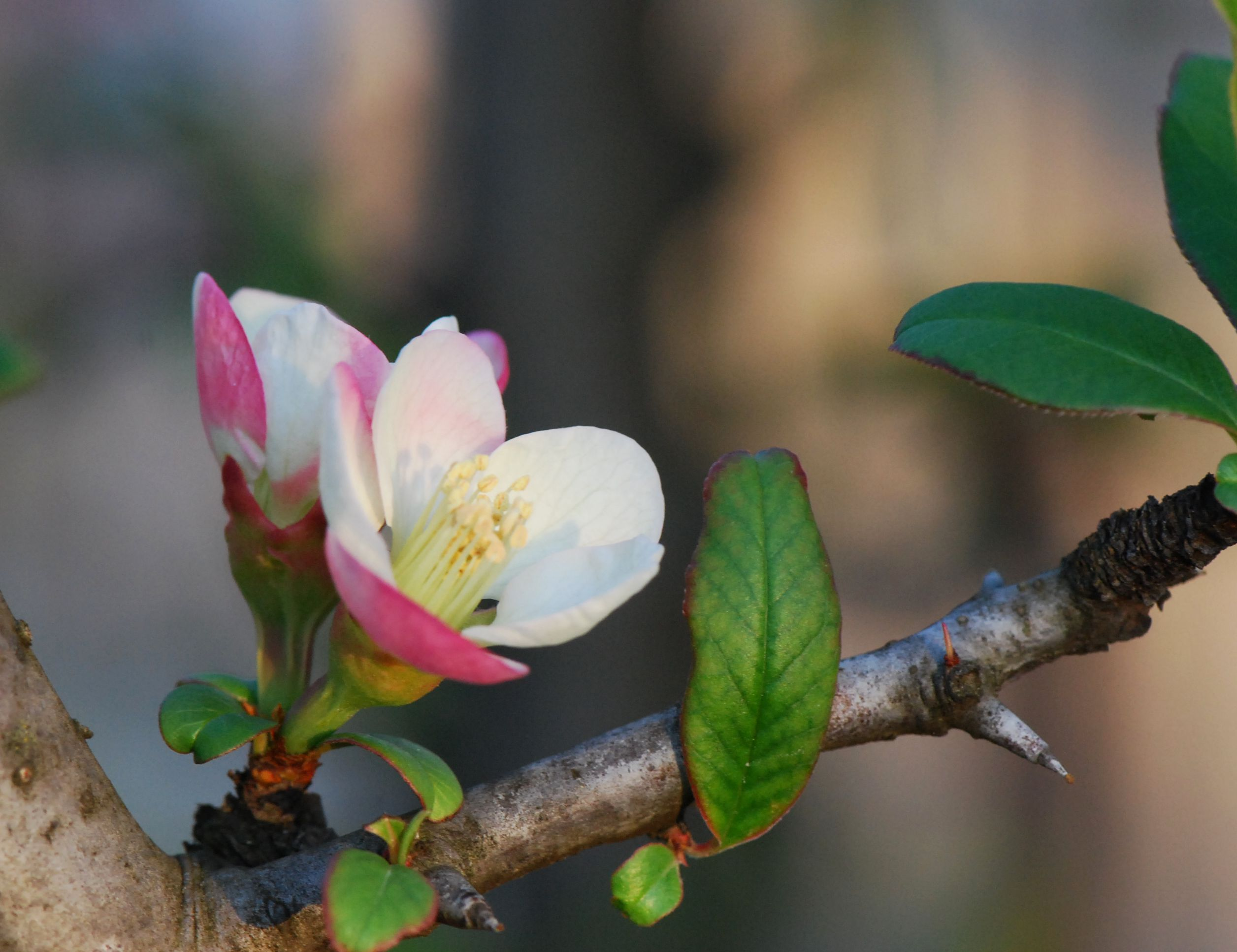 Chaenomeles cathayensis fleurs, épines, feuilles, Jardin des Plantes de Paris